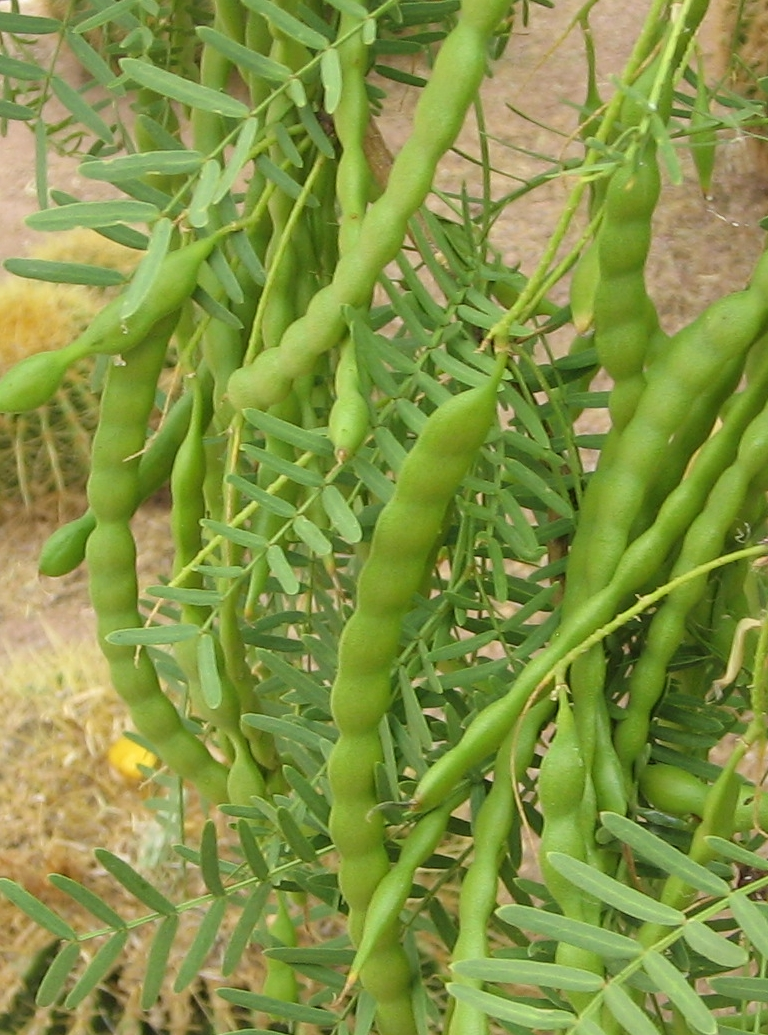 Prosopis glandulosa seed pods